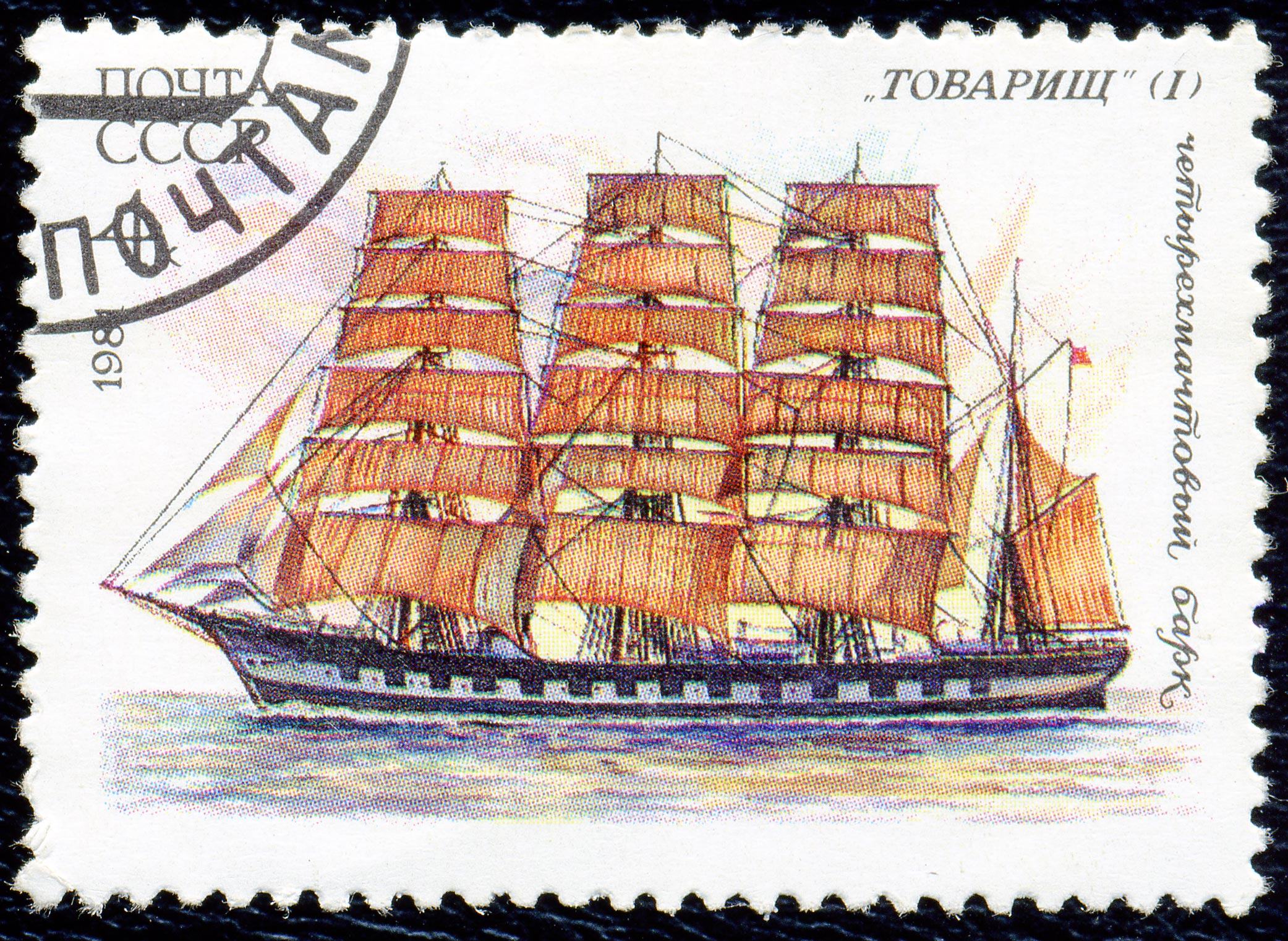 Почтовая марка СССР. 1981. Четырехмачтовый барк Товарищ